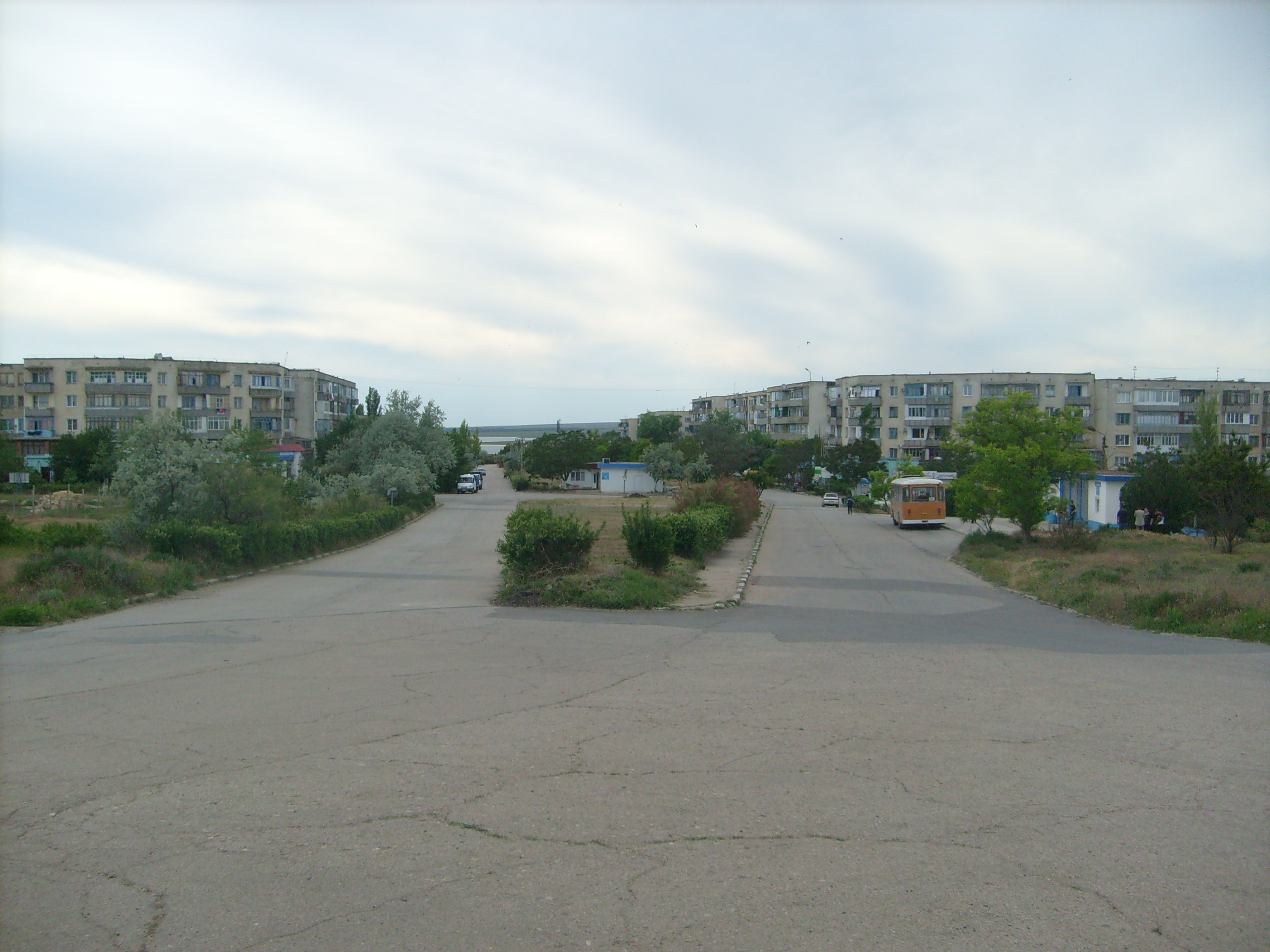 Новоозёрное